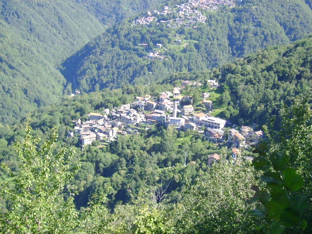 Autoprodotta. Foto della frazione Esio nella visuale del belvedere Cadorna, sulla strada del Tornico che porta a Pian di sole.